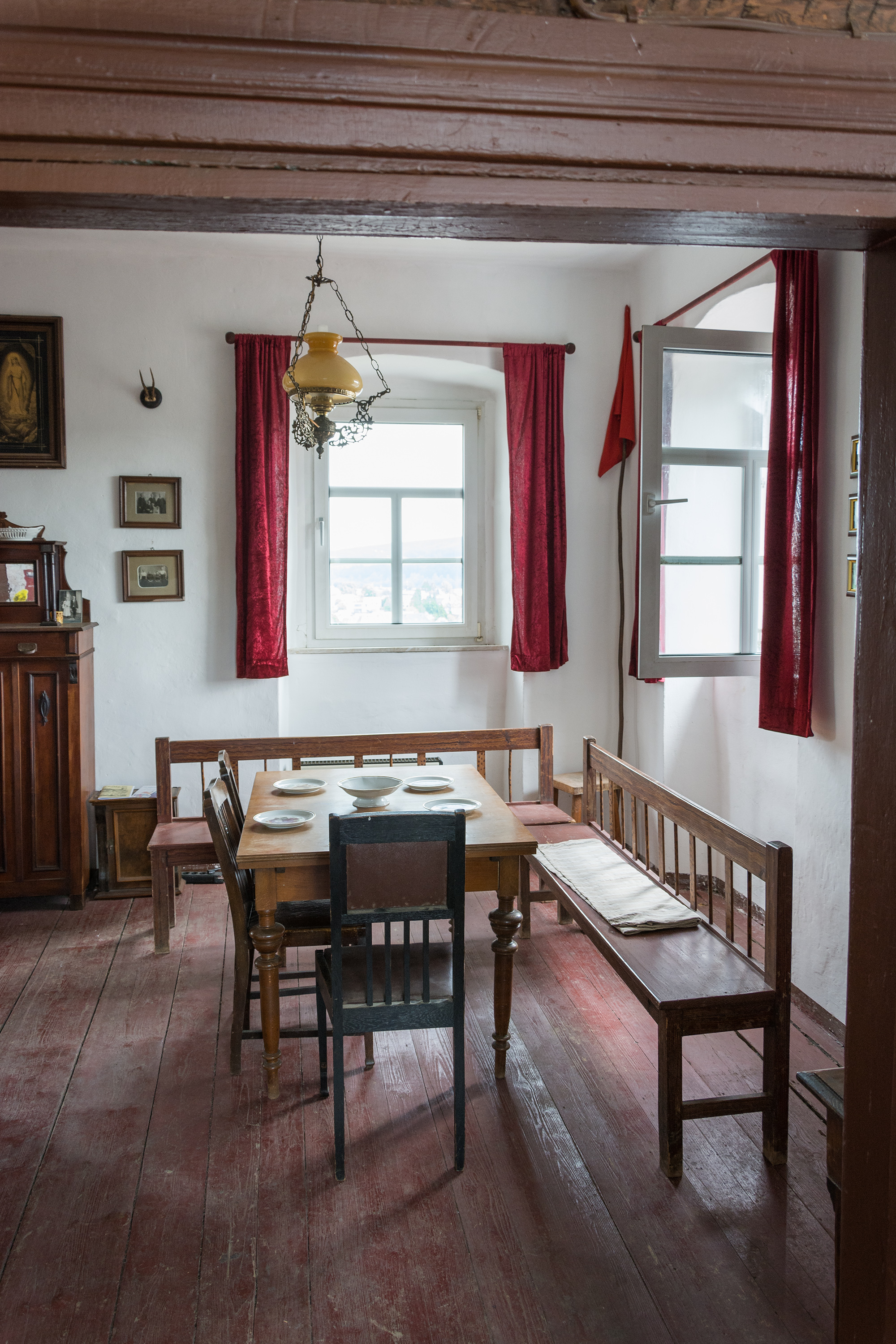 Türmerwohnung des Stadtturms in Kronach.